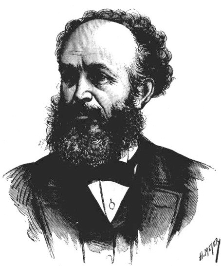 "Les délégués de la République du Transwaal"-"M. Du Toit (ministre de l'Instruction publique)".